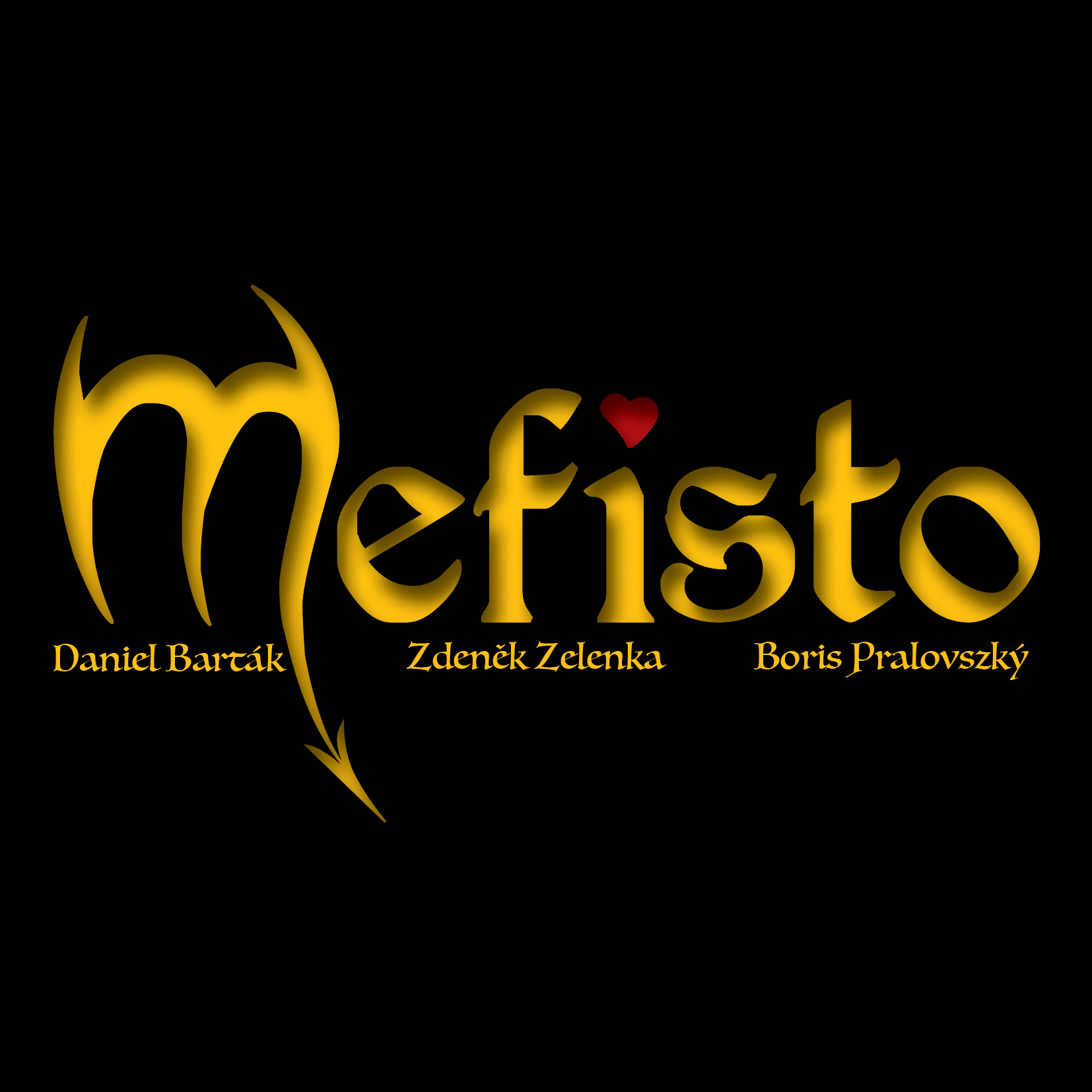 Muzikál Mefisto